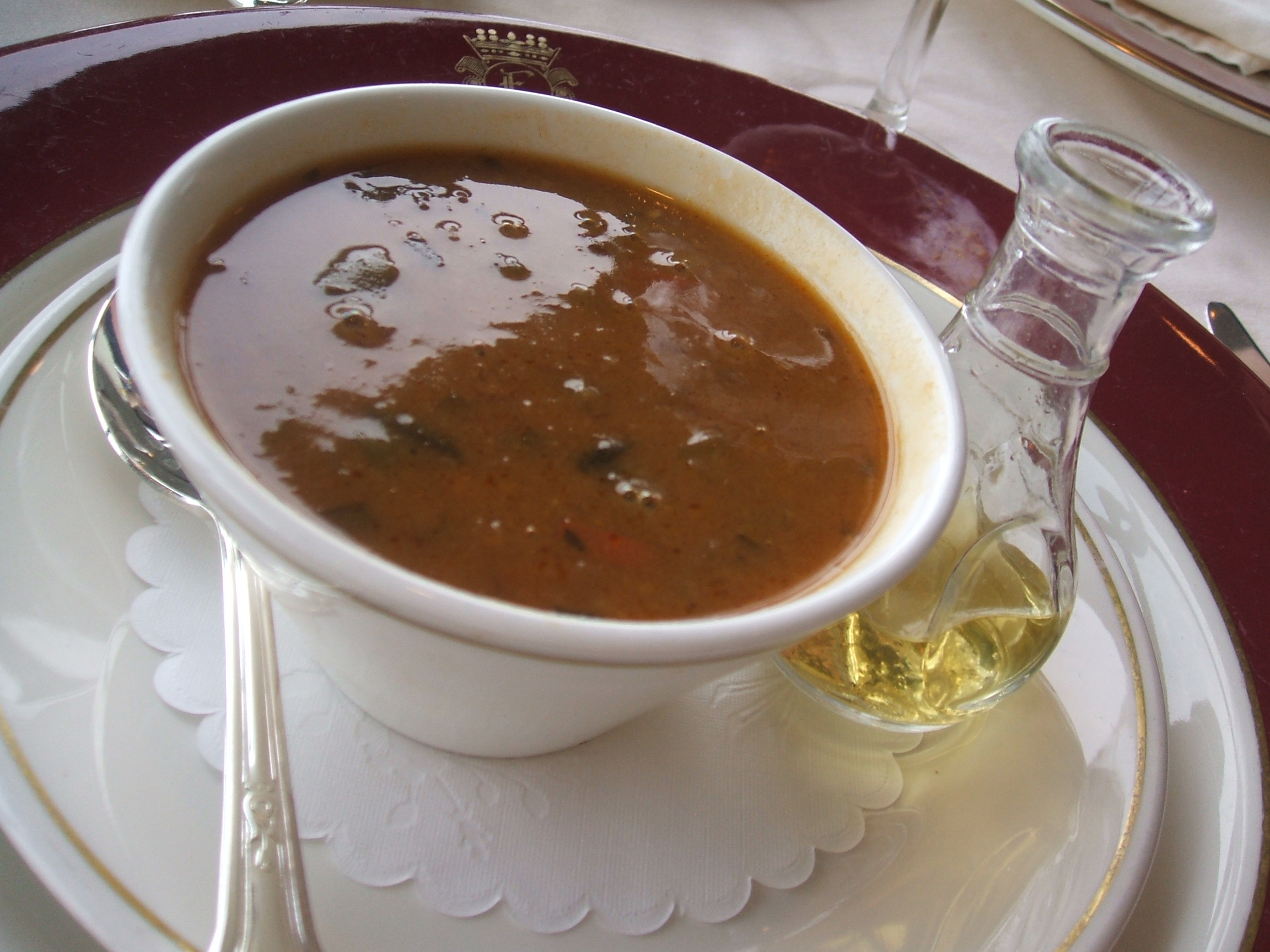 At Edgewater Hotel - Admiralty.